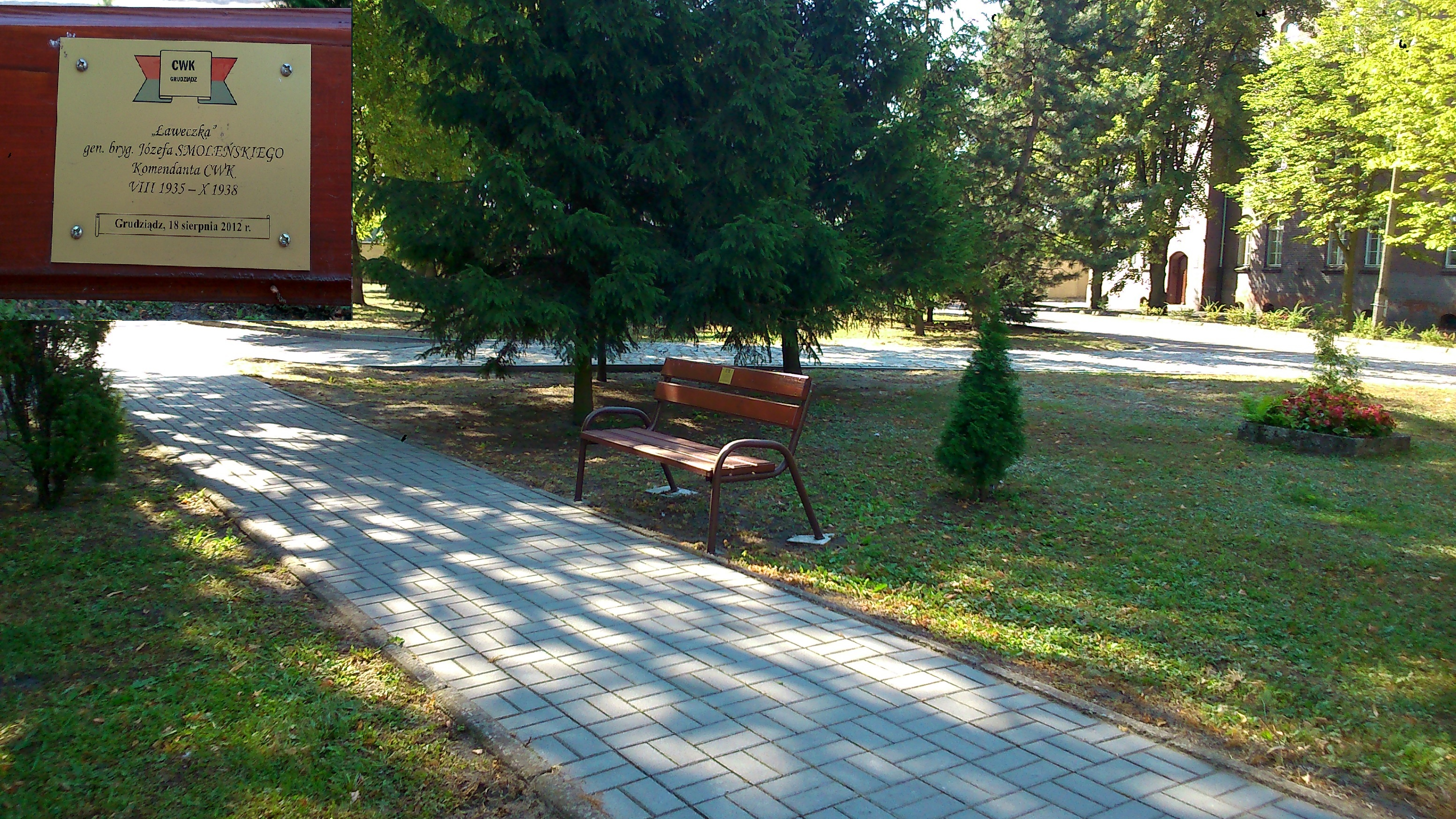 Ławeczka z tabliczką upamiętniającą gen. Józefa Smoleńskiego, dowódcę Centrum Wyszkolenia Kawalerii w Grudziądzu w latach 1935-1938 na terenie dawnych koszar CWK, obecnie koszary 8 Batalionu Walki Radioelektronicznej.